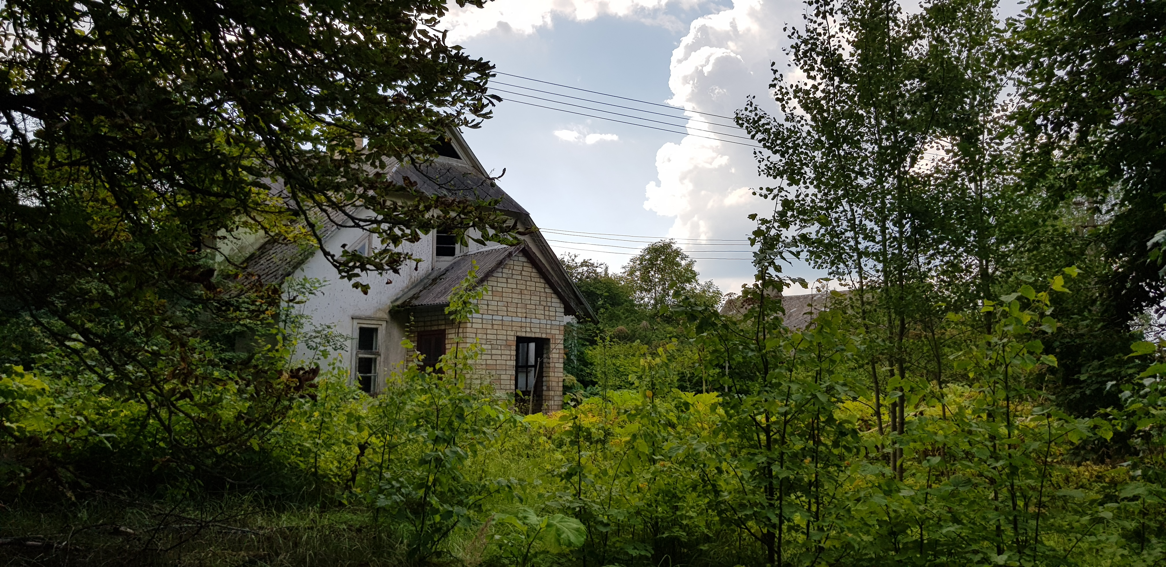 Ķingutu centra apkārtne